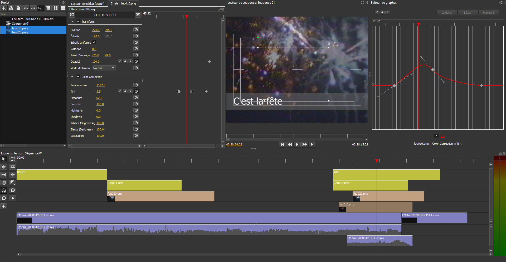 Olive, éditeur vidéo non linéaire, capture d'écran, version en langue française. Exemple avec pistes vidéos et pistes audios.